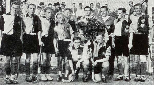 Herrenteam 1937 des Berliner SC, der erste Deutscher Hockeymeister